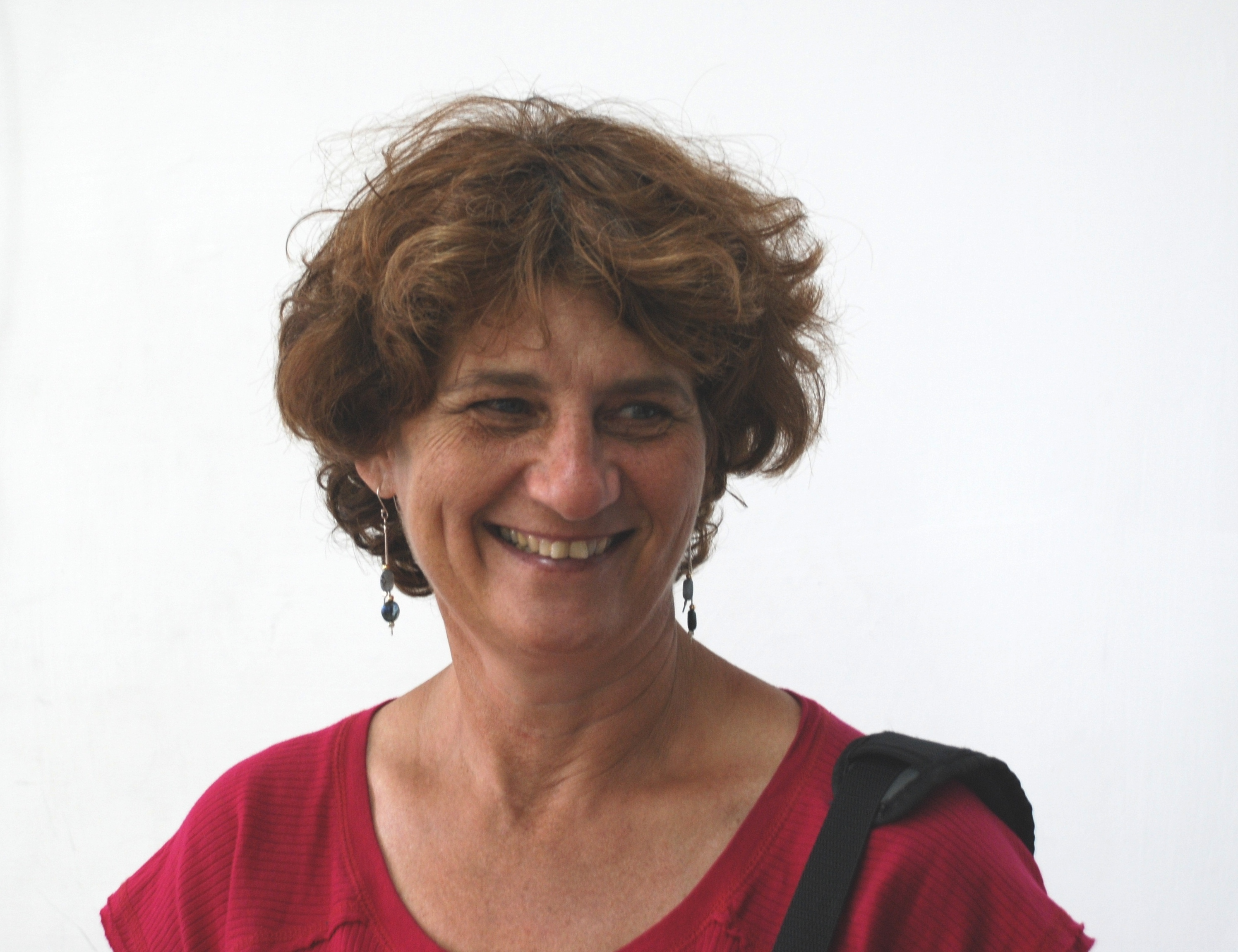 אור-נה רן היא פסלת ישראלית. מתמחה בעיקר בפיסול סביבתי במרחב הציבורי